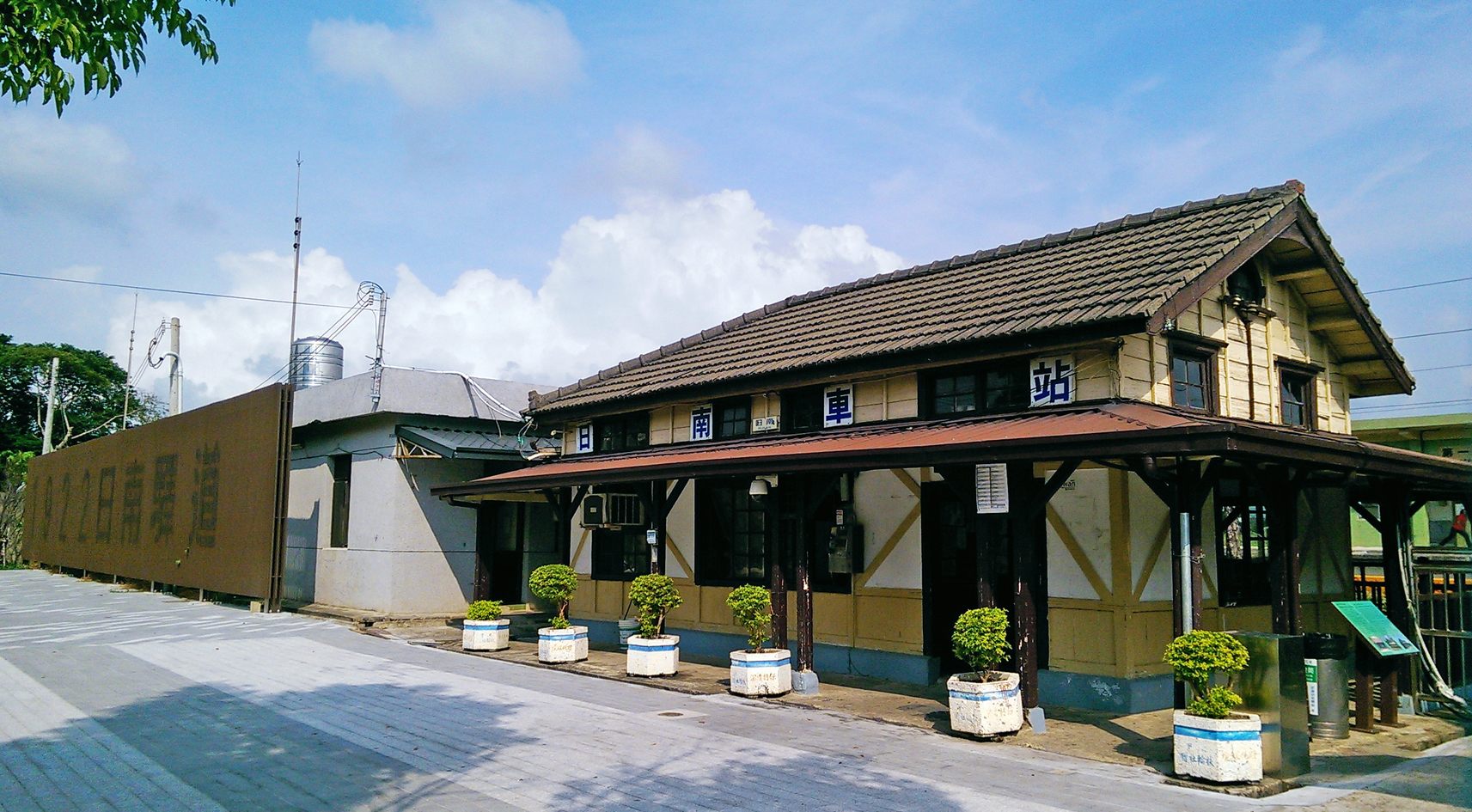 中文（台灣）: 大甲日南車站